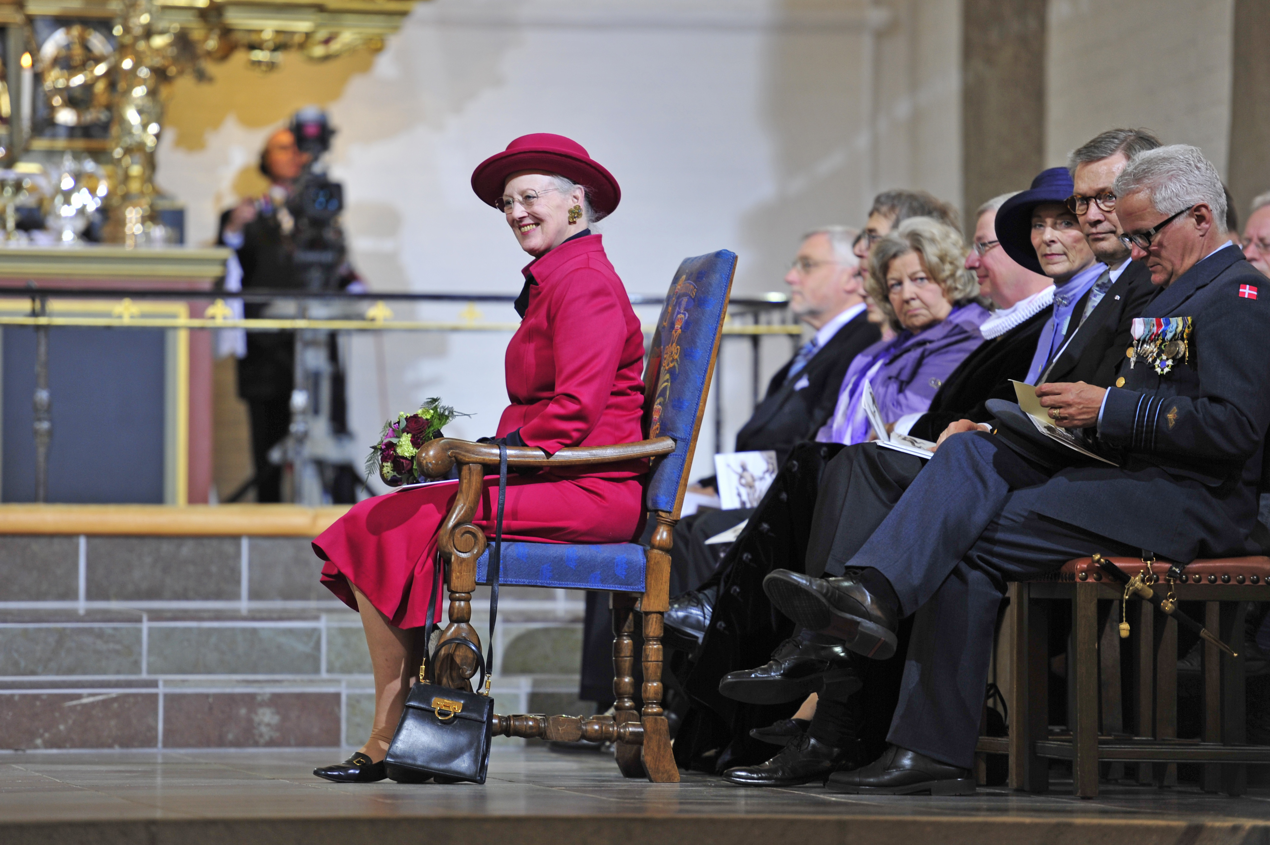 Dronning Margrethe ved bispevielse af Henning Toft Bro i Budolfi Kirke, Aalborg. Birthe Rønn Hornbech ses i lilla tøj bagved Dronningen.